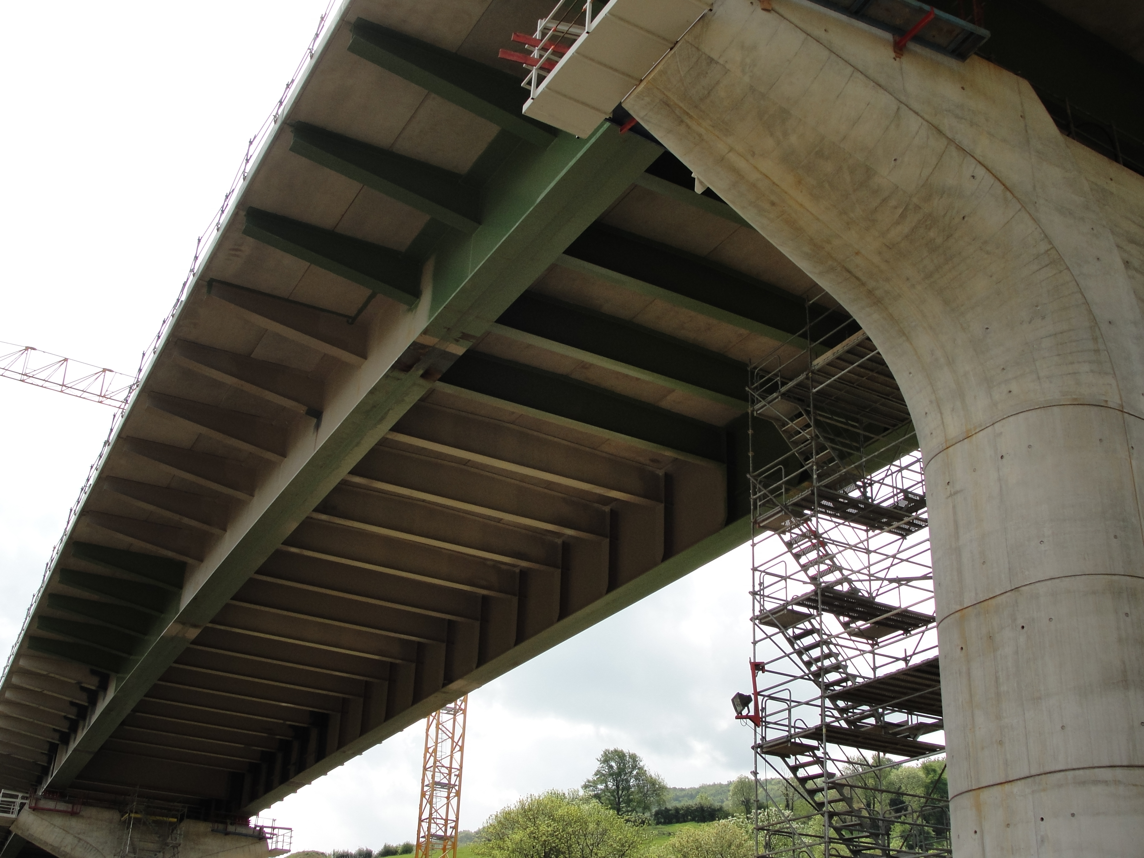 Dessous viaduc du Torranchin (Rhône) - printemps 2010.